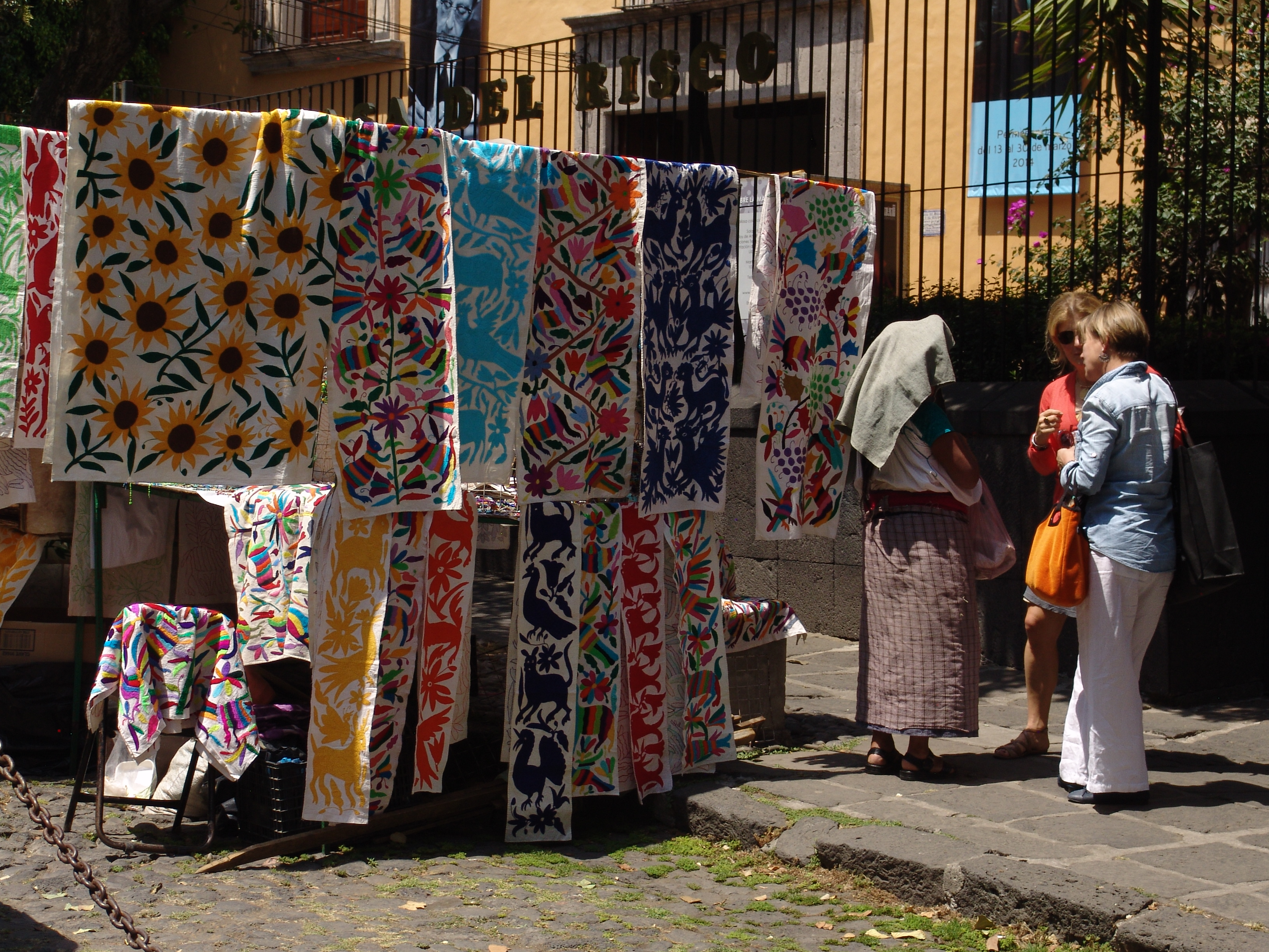 Fotografías del "Bazar del Sábado". Distrito Federal, Colonia San Ángel, Álvaro Obregón.